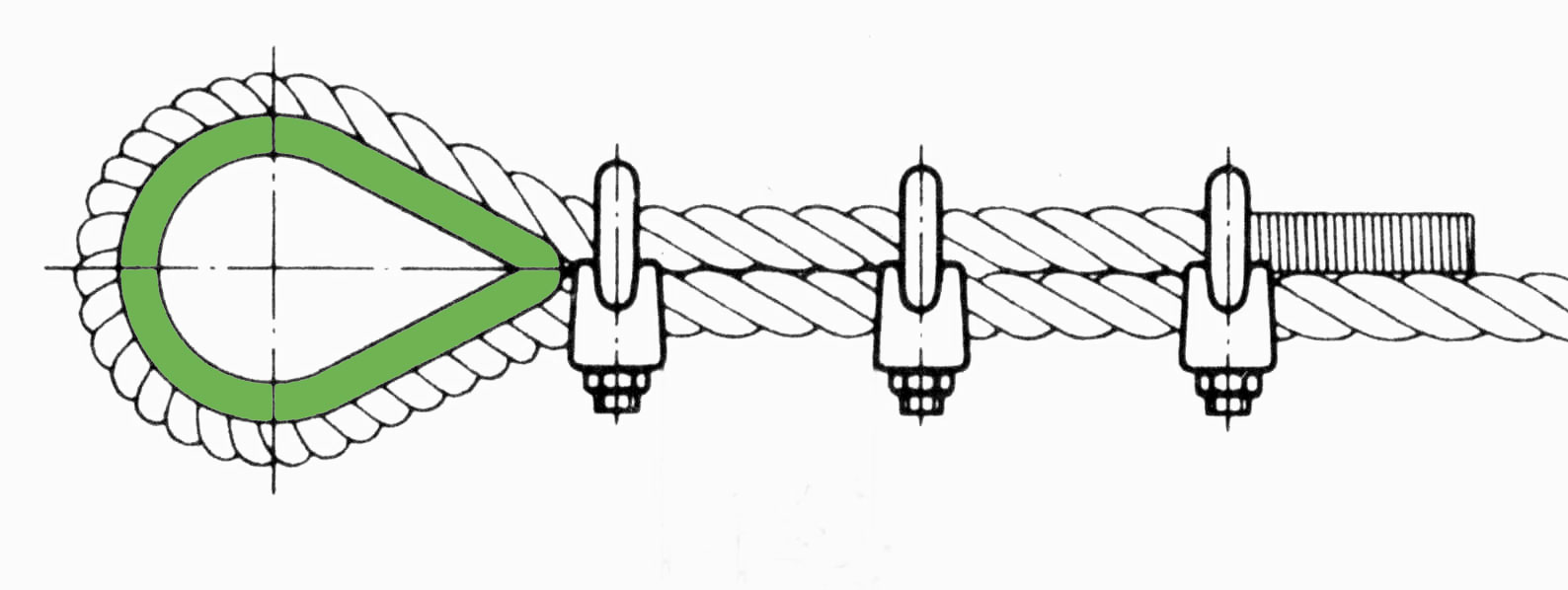 Montage vun Drotseelklemmen op engem Seel mat Kausch (gréng).